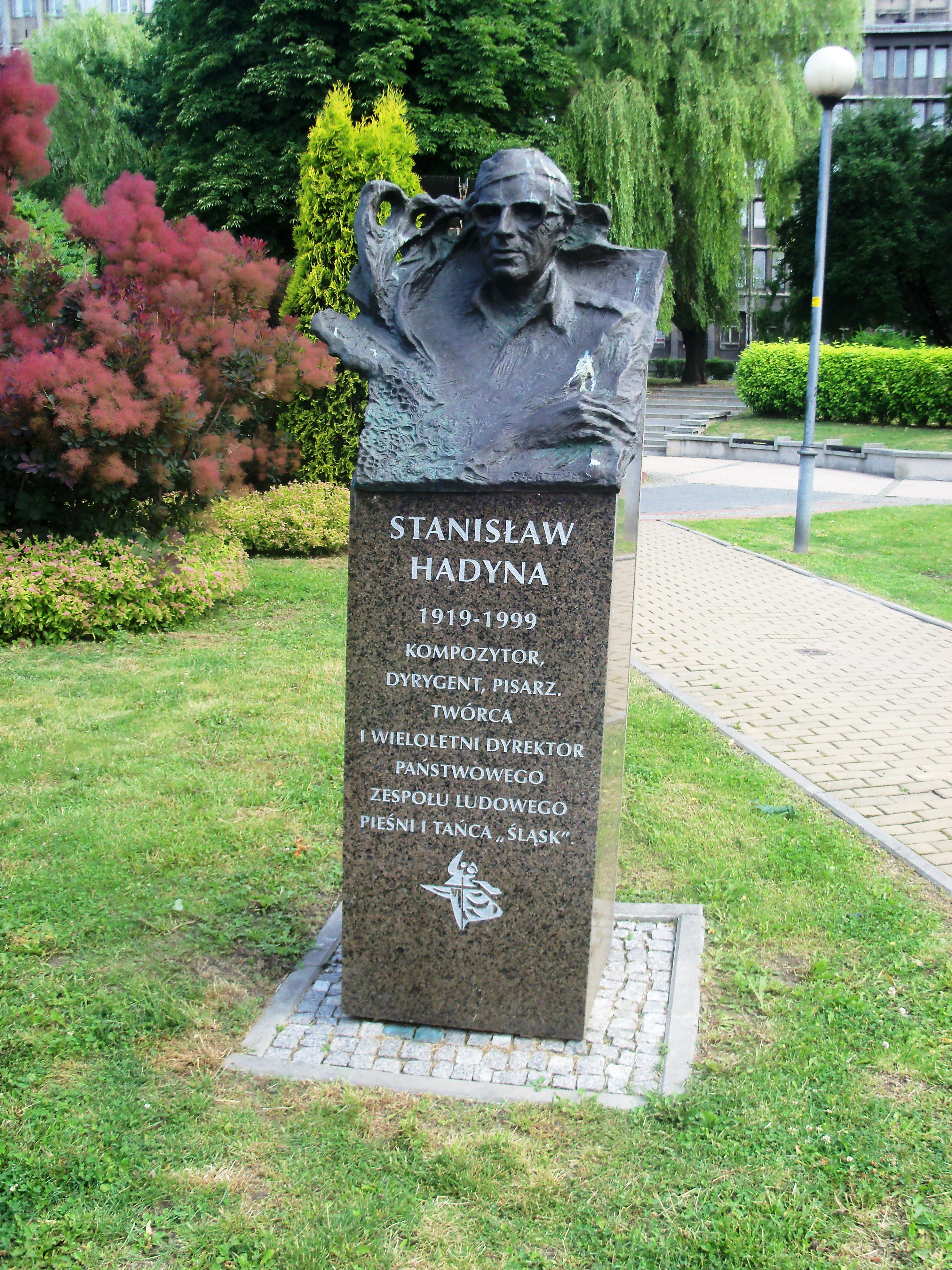 Galeria Artystyczna na placu Grunwaldzkim w Katowicach: Rzeźba przedstawiająca Stanisława Hadynę